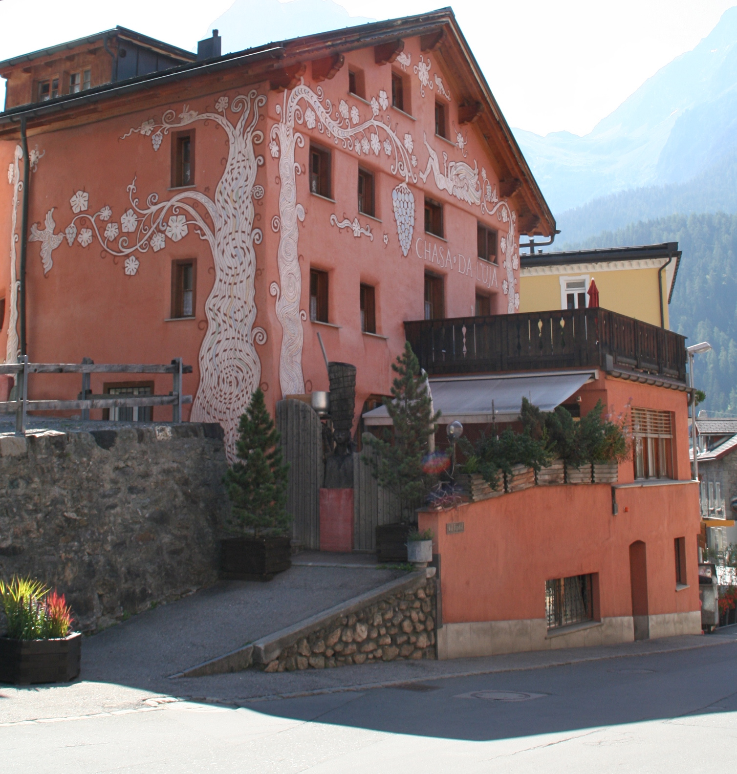 Haus in Scuol, bemalt von Steivan Liun Könz